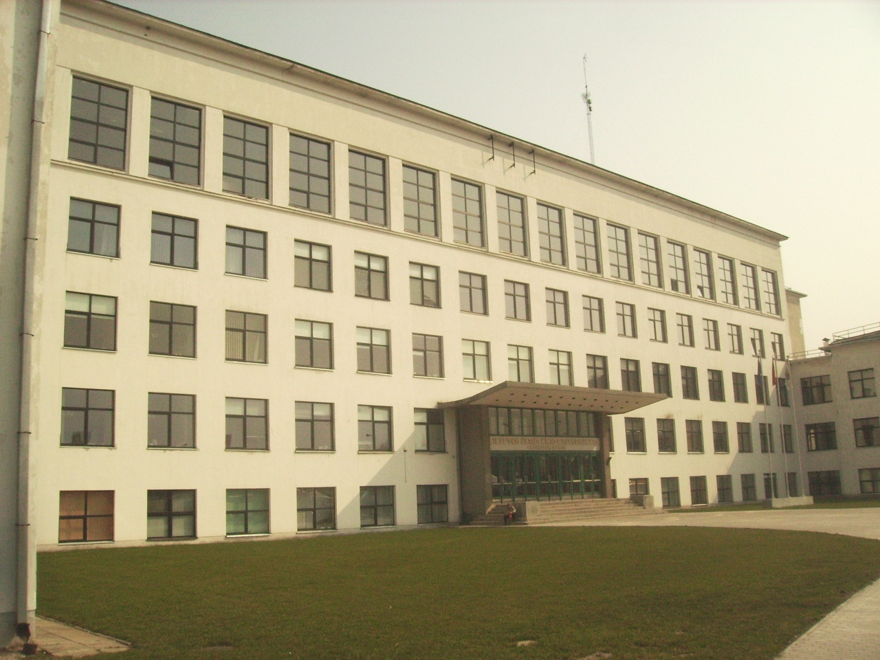 Lietuvos žemės ūkio universitetas